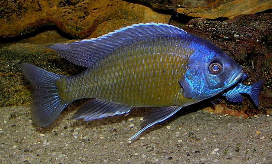 Copadichromis borleyi "Kadango" (male)